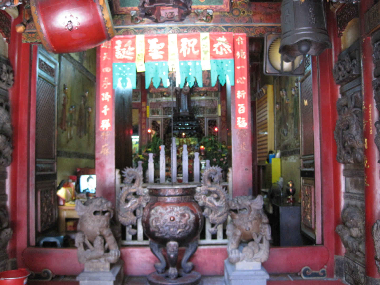 臺南景福祠三川門